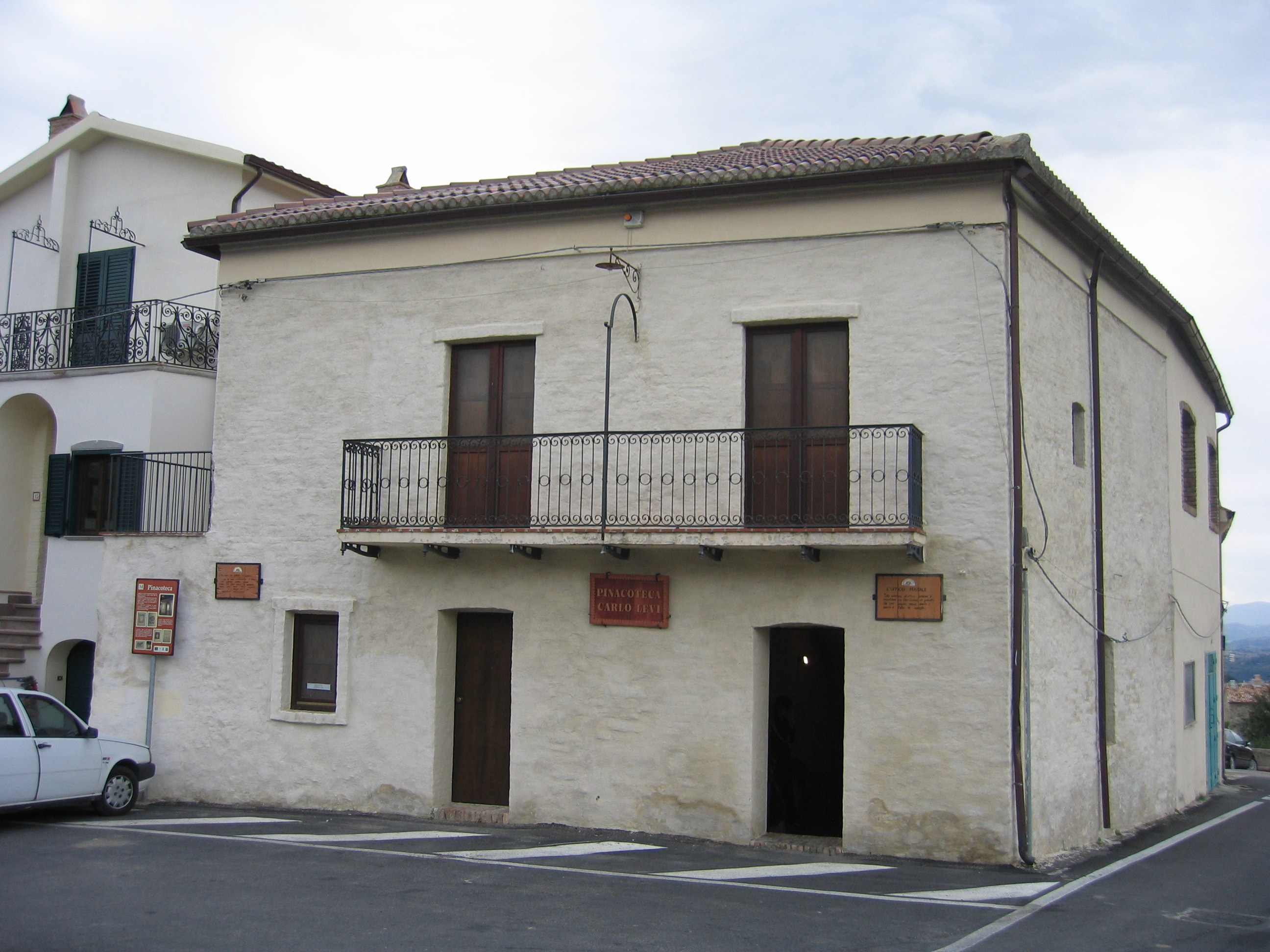 Aliano. Palazzo dei Dottori di Napoli